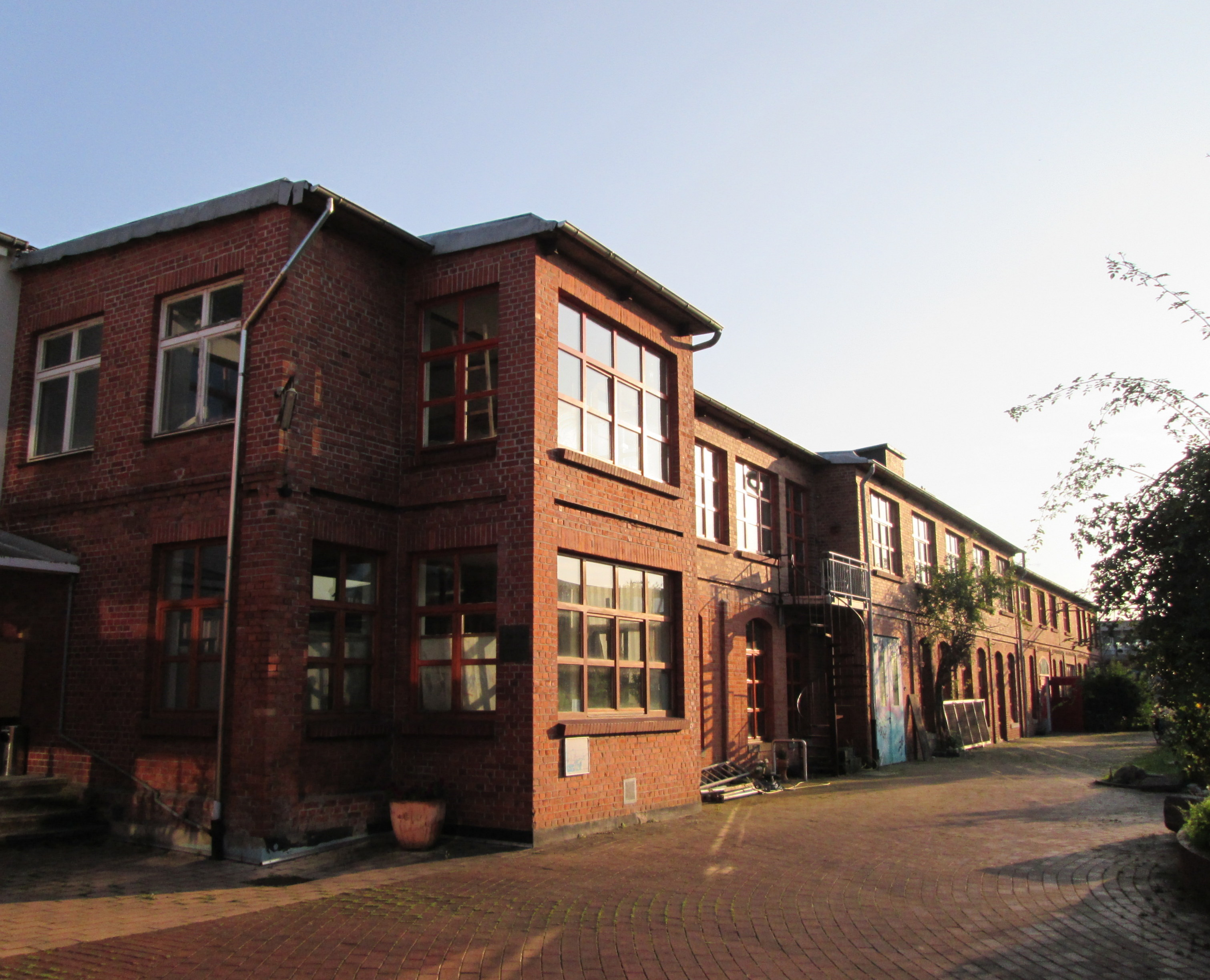 Ehemalige Fuchswerke - Hannover-Badenstedt Empelder Straße